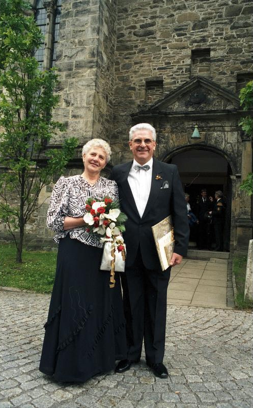 Juni 1988 Clausthal-Cellerfeld: Feier zum 50. Hochzeitstag (Goldene Hochzeit) mit Bergmannkapelle.